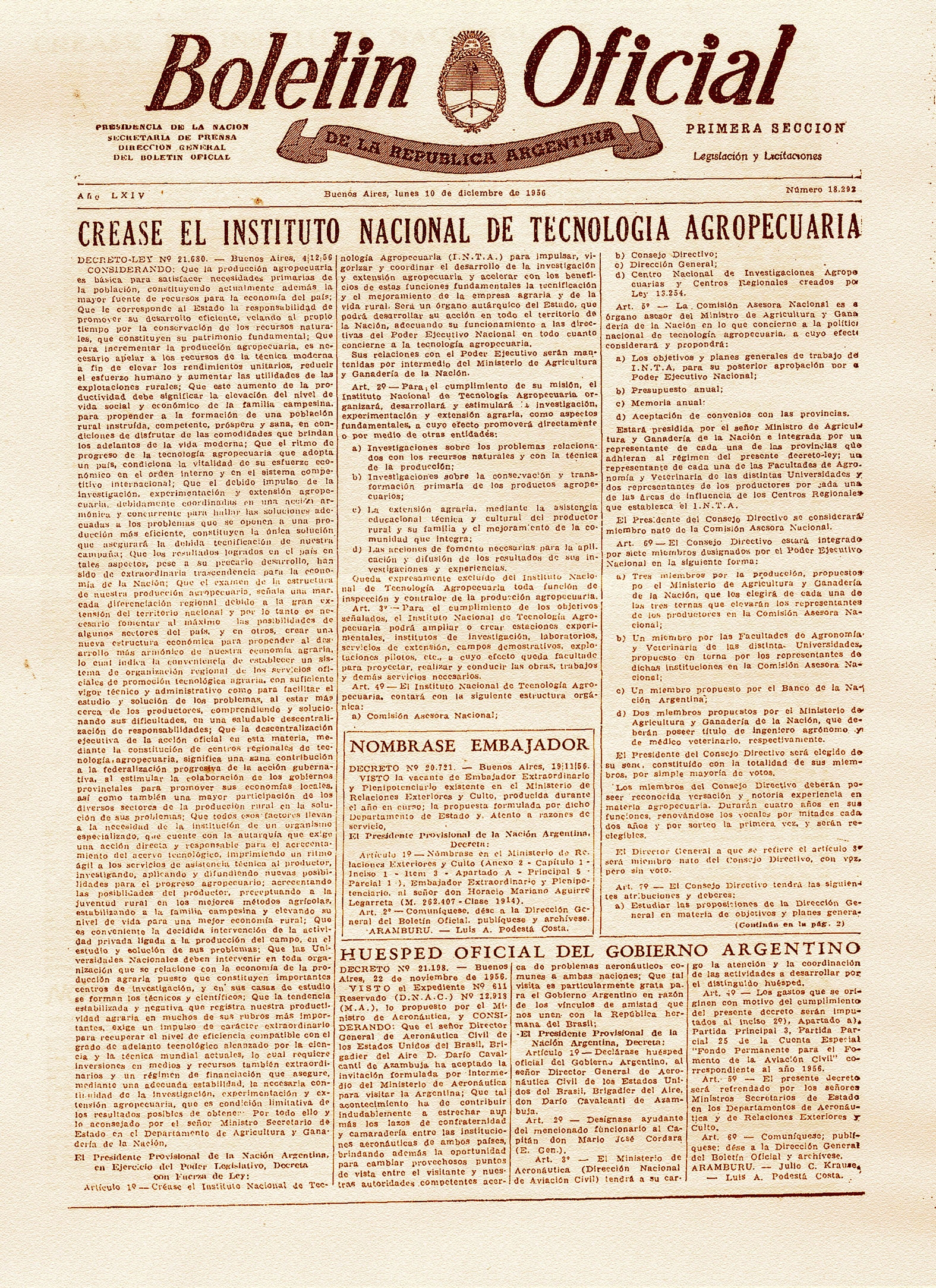 Reproducción del boletín oficial del 10 de diciembre de 1956, promulgando la Ley de creación del INTA